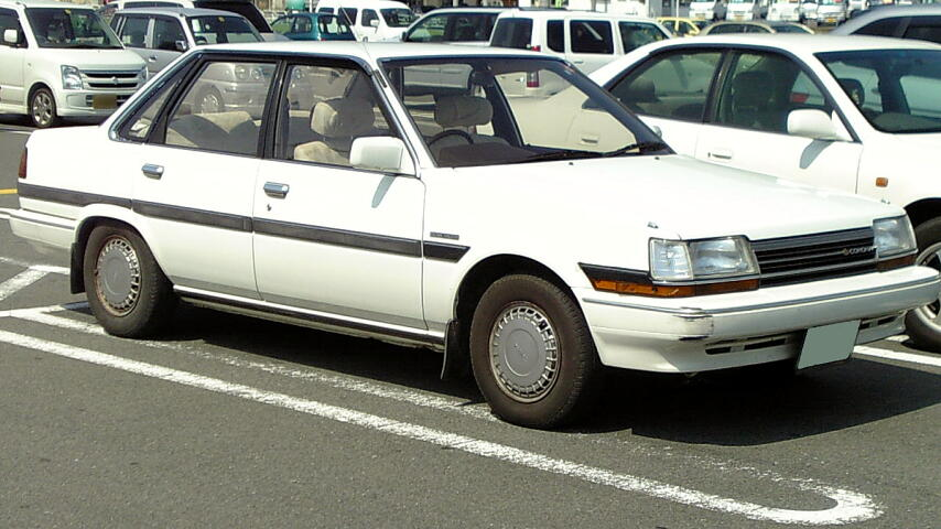 トヨタ・コロナ（8代目）